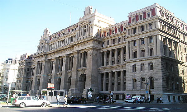 Sede del Banco Central de la República Argentina